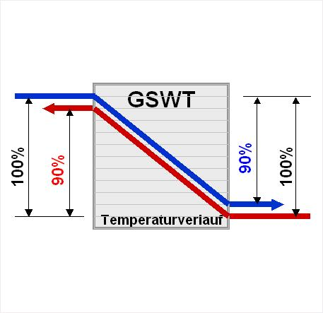 Temperaturverlauf im GSWT SEW-GmbH, 47906 Kempen / Germany 05.Juni.2007